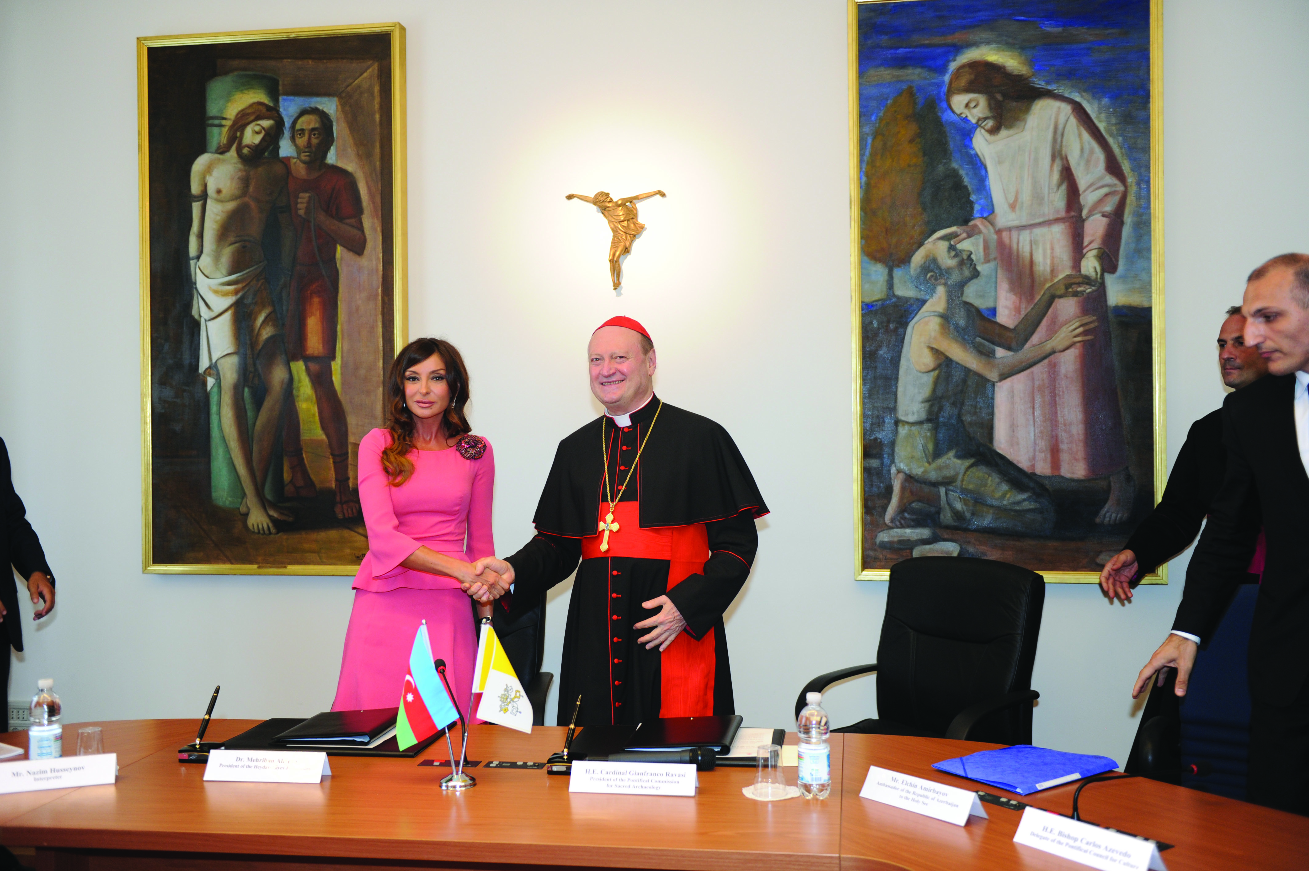 Heydər Əliyev Fondu ilə Müqəddəs Taxt-Tac arasında “Roma katakombalarının bərpasına dair ikitərəfli Saziş”in imzalanması mərasimi. 22 iyun 2012-ci il.